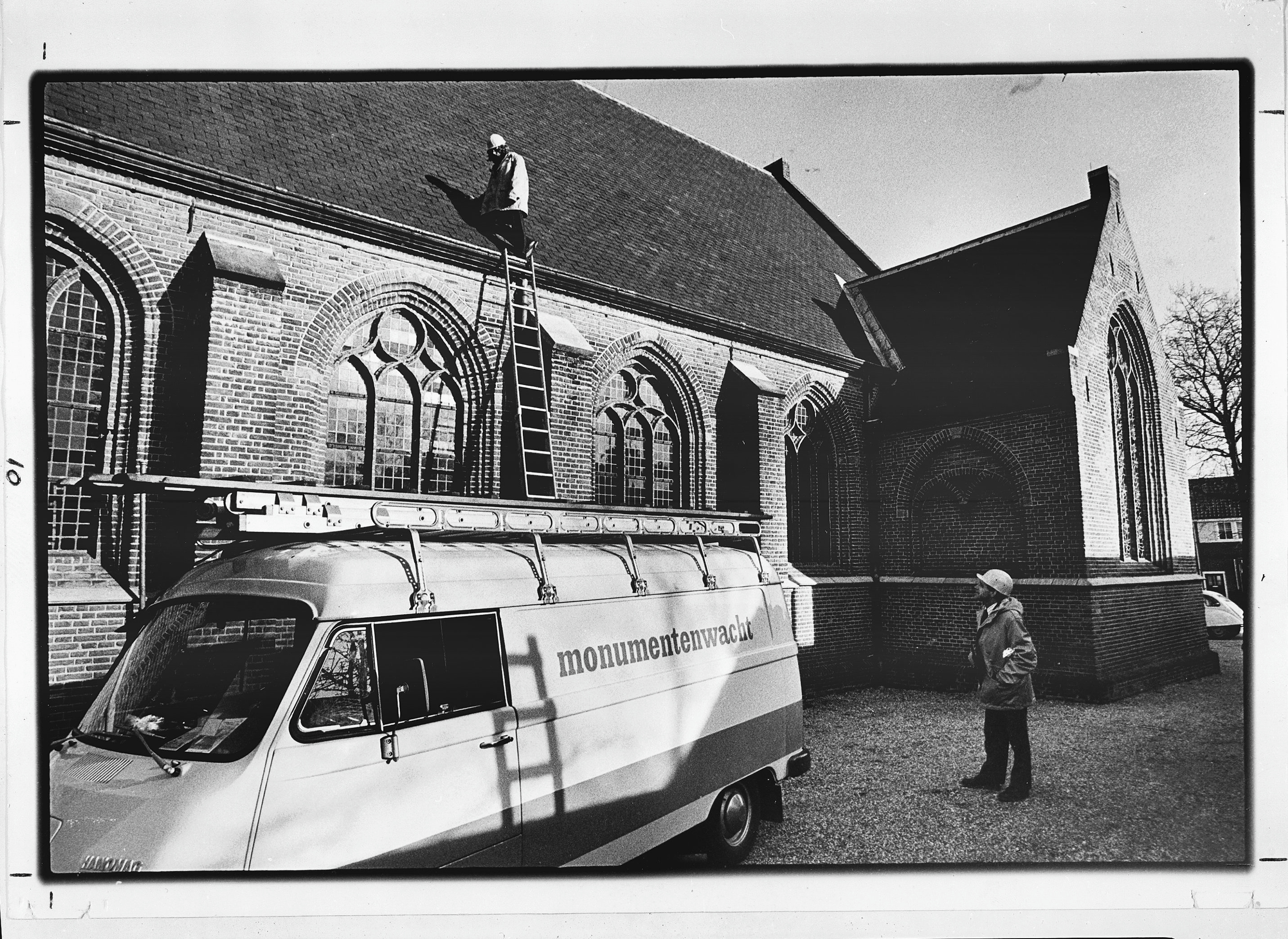 DIVERSEN: Monumentenwacht (in aktie)